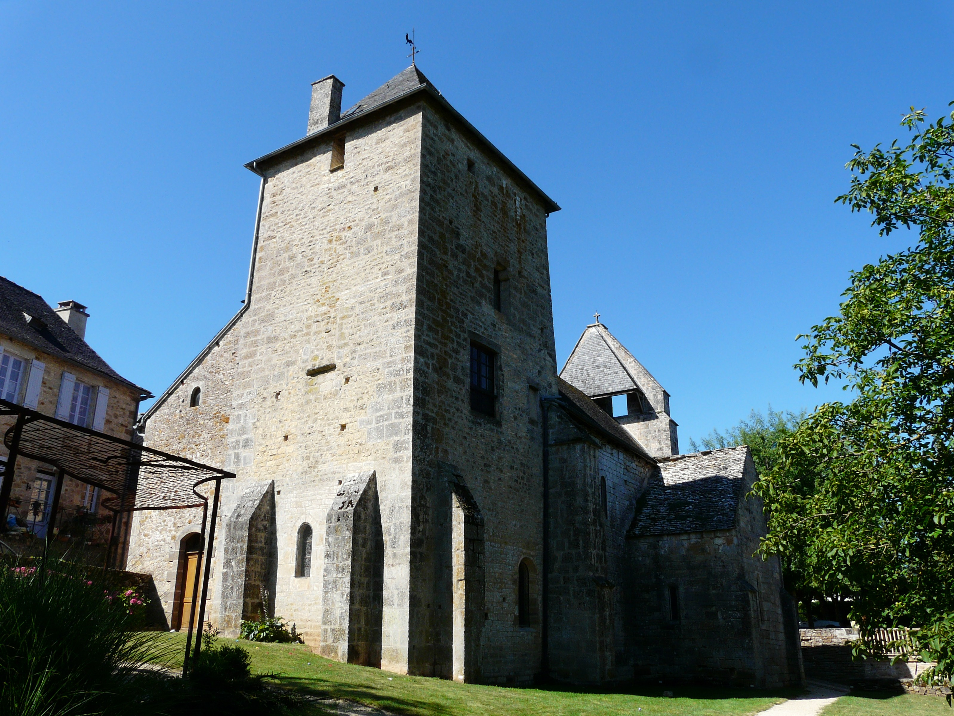 L'angle nord-est de l'église Notre-Dame de La Dornac, Dordogne, France.